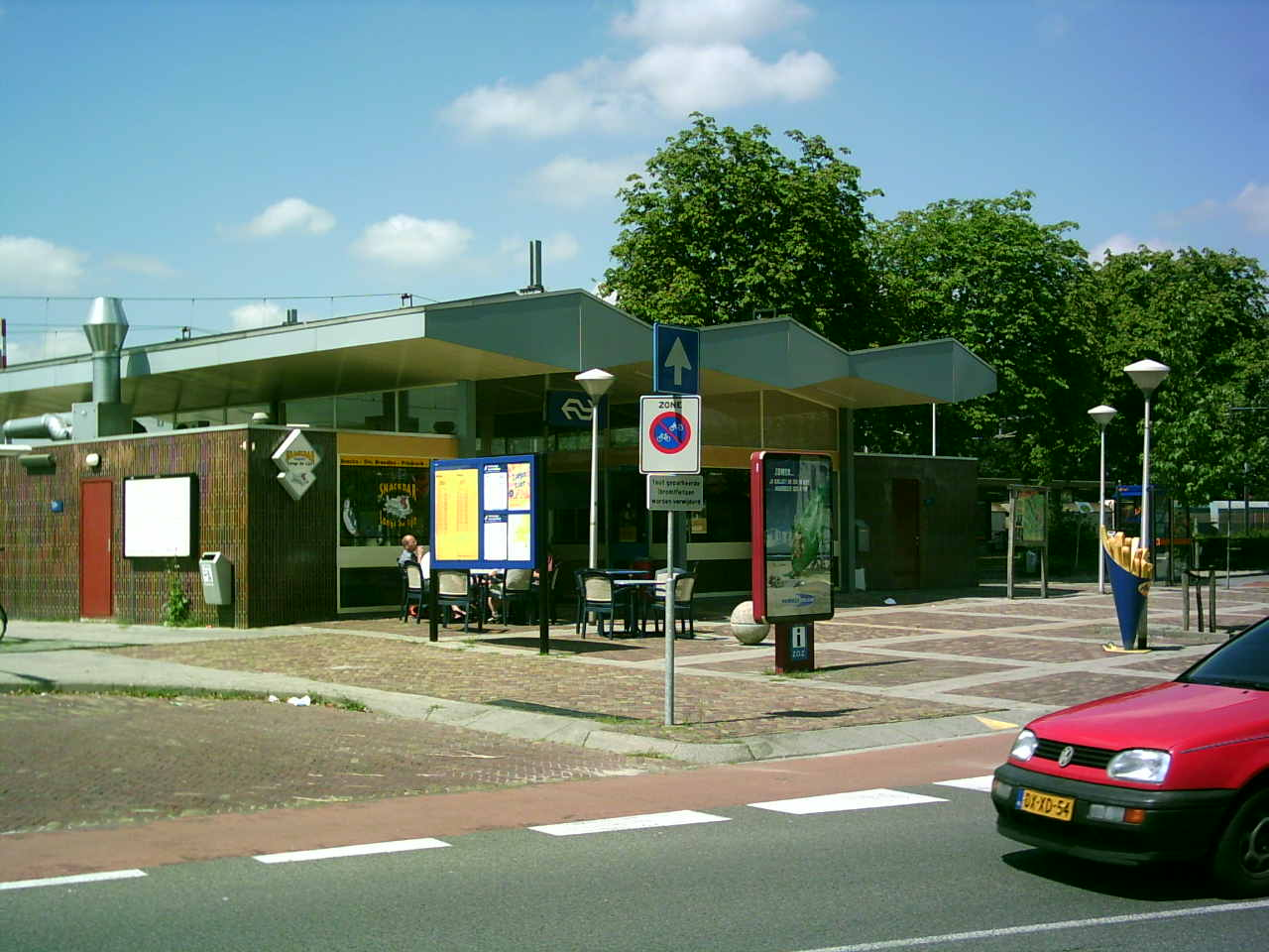 Het station van Coevorden. Deze foto is eerder gepubliceerd onder mijn eigen naam op